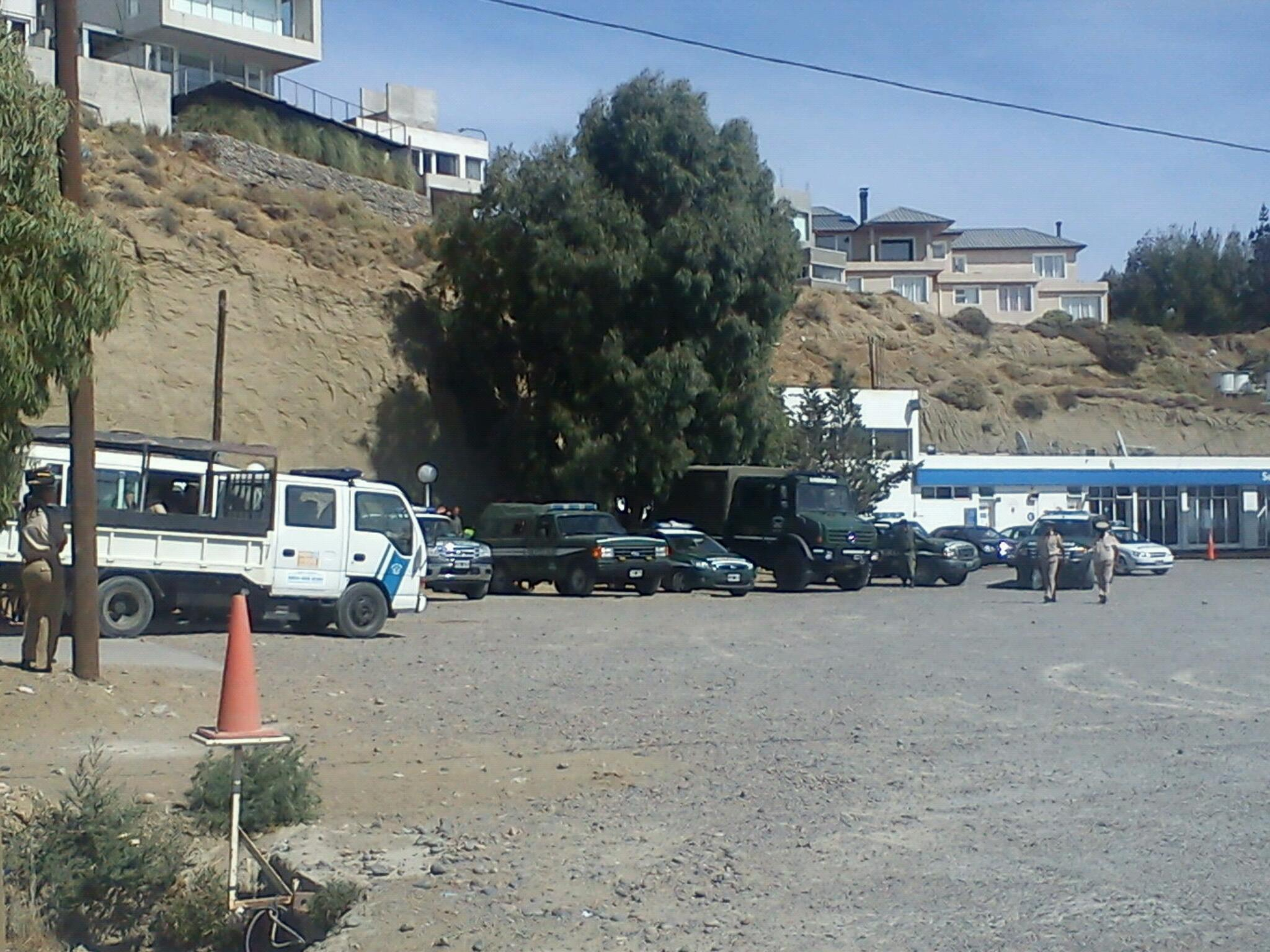 Dias de escasez de agua en Caleta Olivia